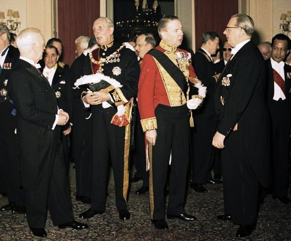 Neujahrsempfang 1961 in der Redoute, Bad Godesberg